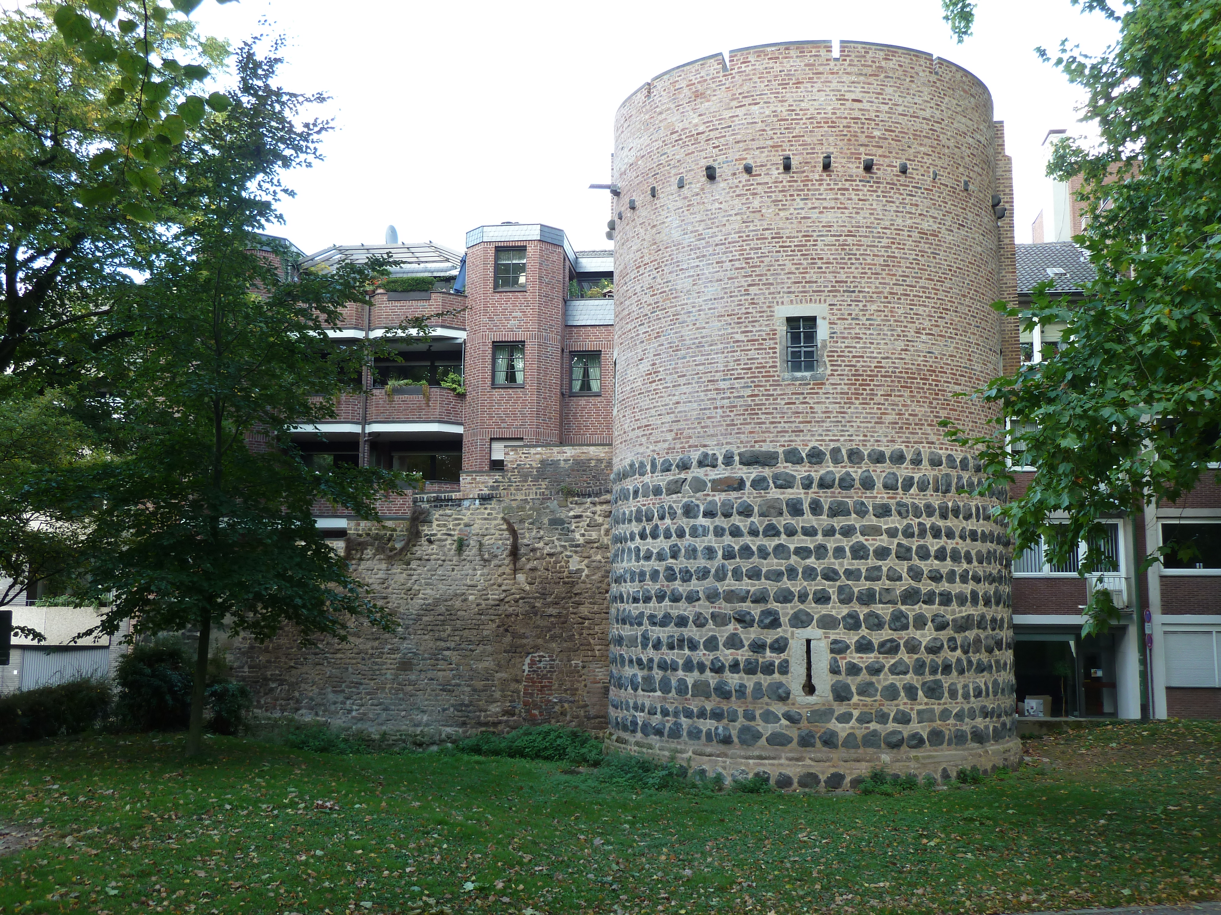 Ansicht vom Park; 13./15. Jahrhundert; Halbrundturm der mittelalterlichen Stadtmauer von Neuss